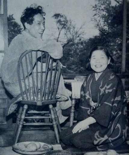 秋野不矩・沢宏靱夫妻